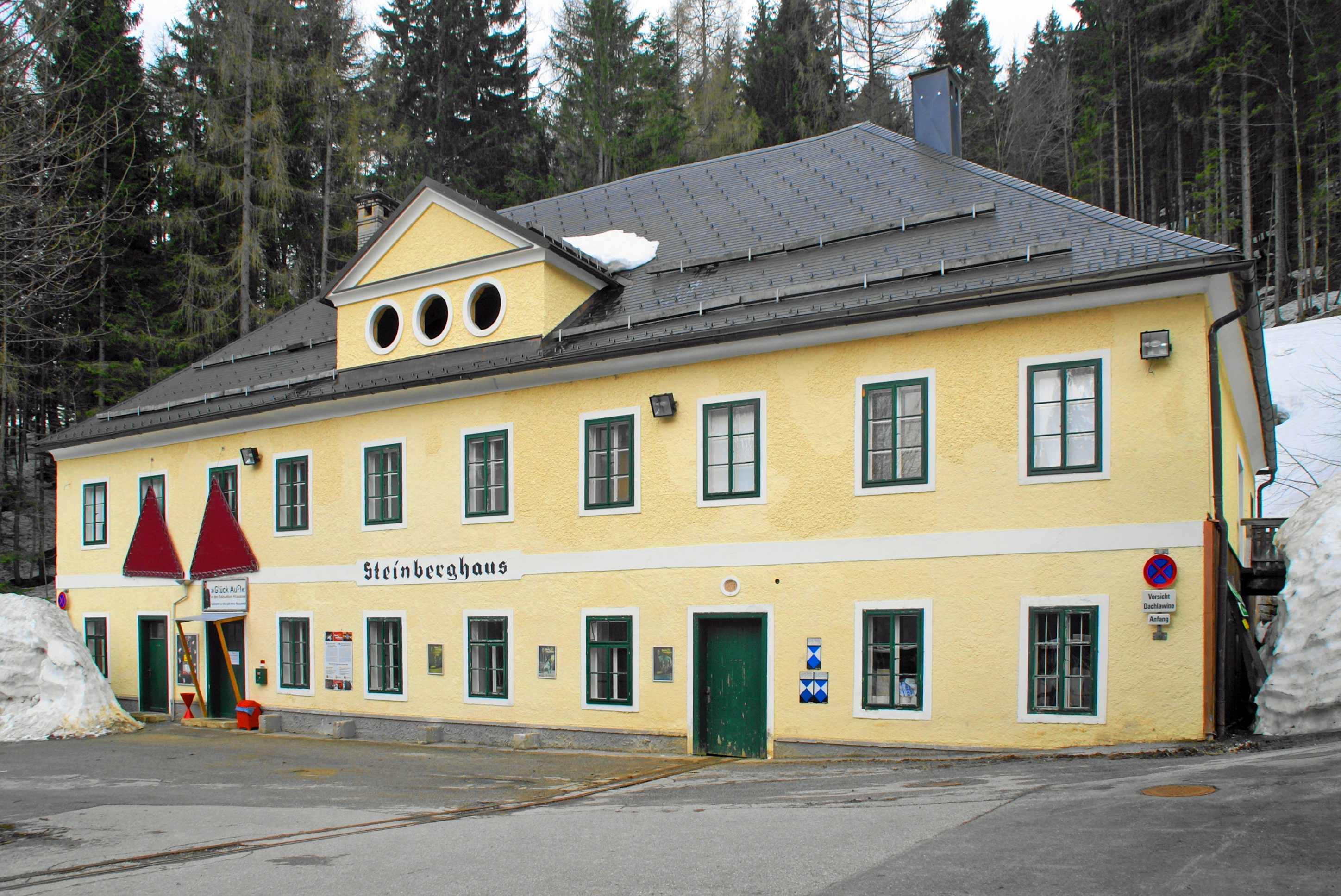 Knappenhaus des Salzbergwerks, Steinberghaus